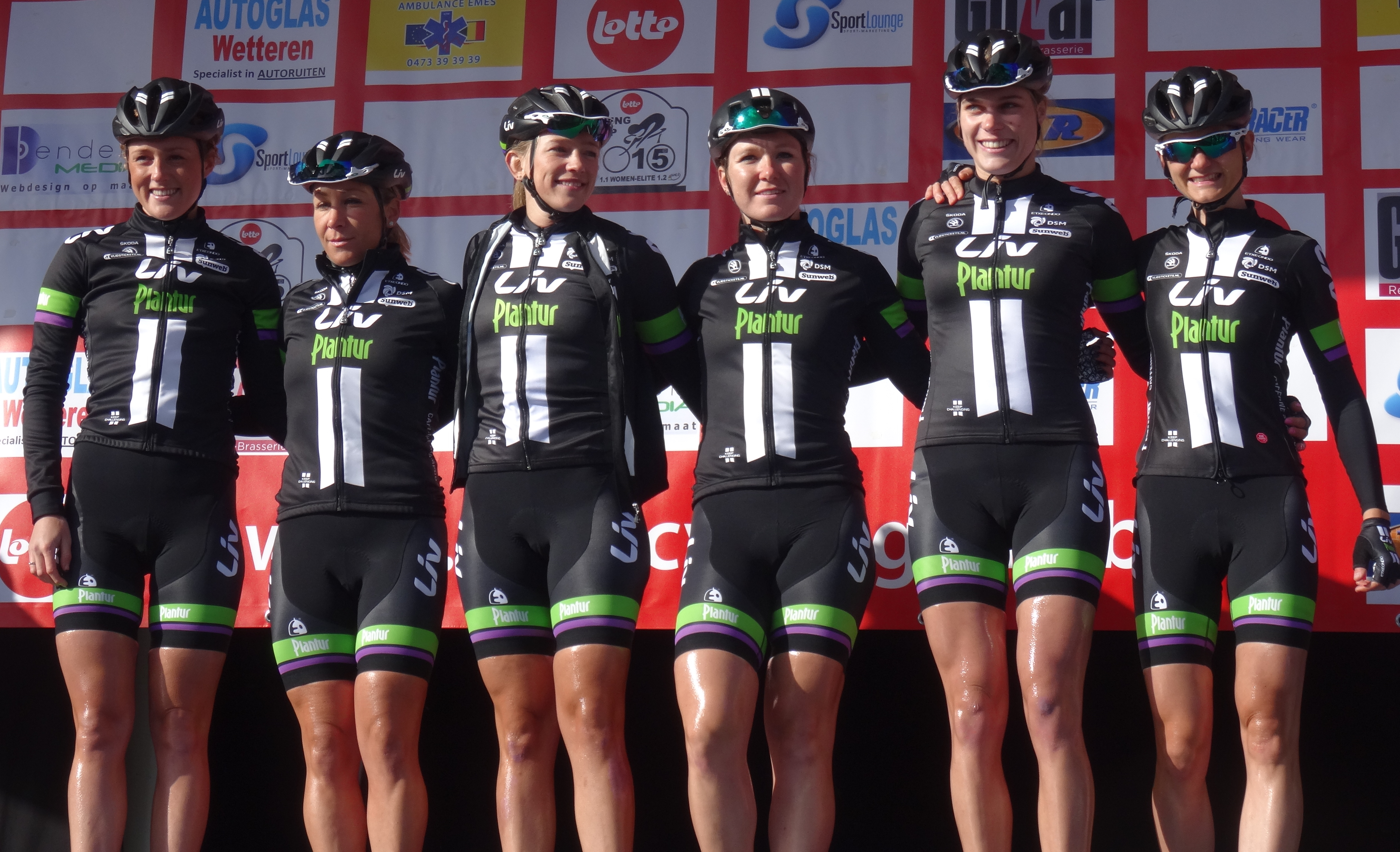 Reportage réalisé le mercredi 4 mars à l'occasion du départ du Samyn des Dames 2015 et du Samyn 2015 à Quaregnon, Belgique.